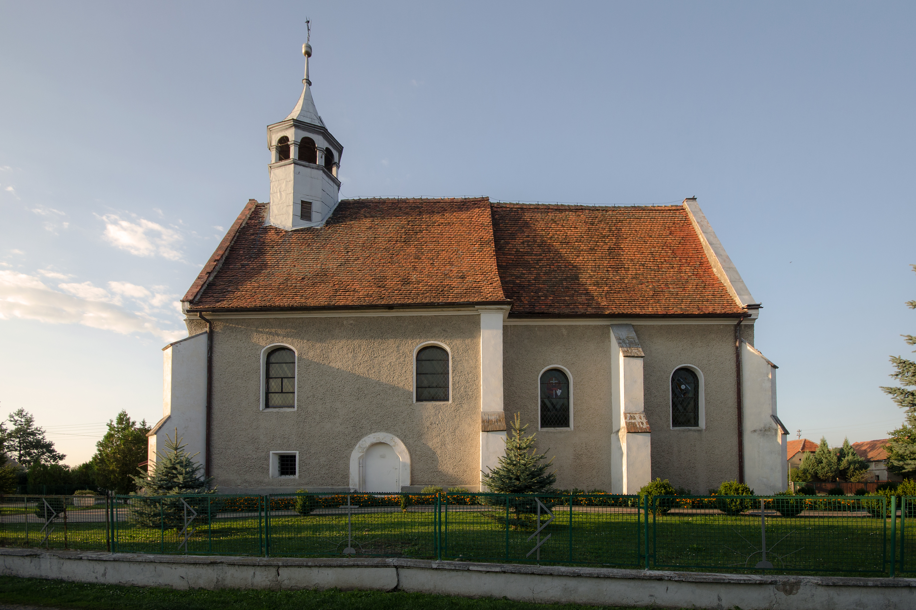 Osiek Grodkowski - rzymskokatolicki kościół filialny p.w. Wniebowzięcia NMP, XIV, XVI, XVIII